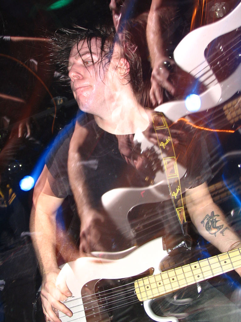 Underoath in Amsterdam 02/03/2005